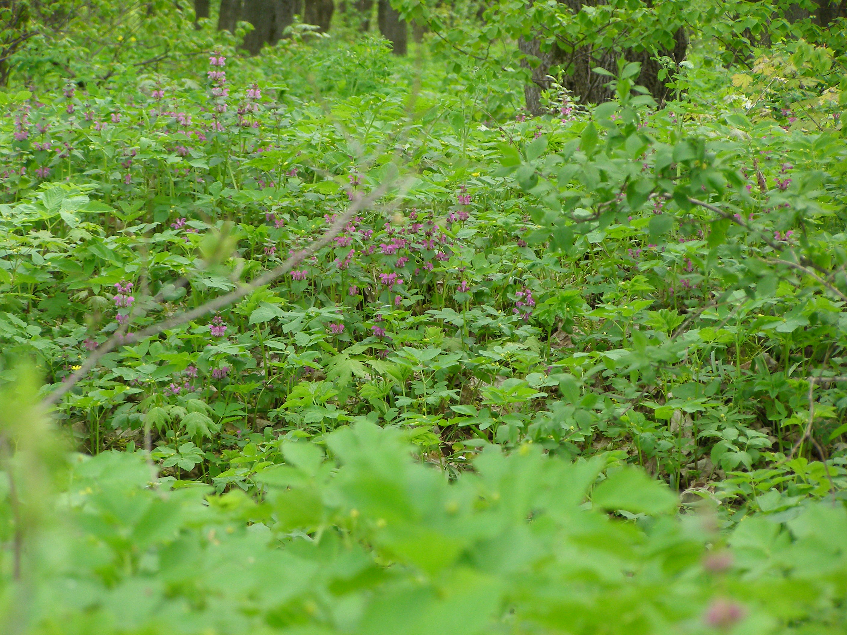 «Вовчанський»